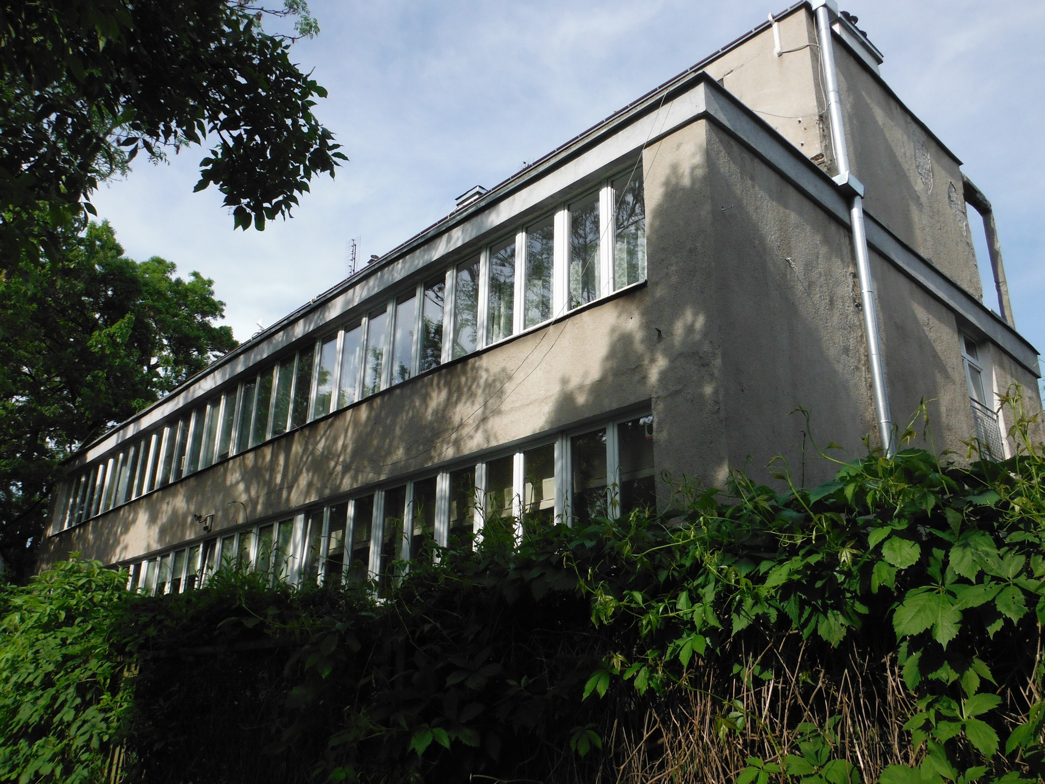 Dom Krzymuskich (ul. Walecznych 12 w Warszawie), zaprojektowany przez Helenę i Szymona Syrkusów, 1935-1937.